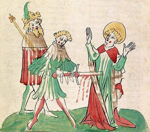 Ermordung des Hl. Kilian; links hinten Herzog Gosbert